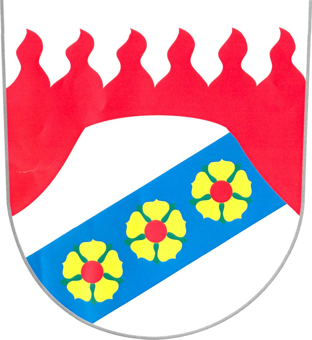 Znak obce Žďár nad Metují